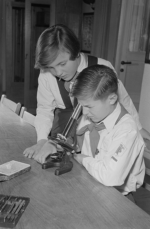 Original image description from the Deutsche Fotothek Zwei Kinder mit einem Mikroskop